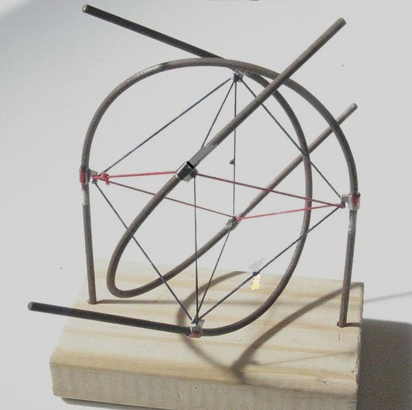 Tensegrity aus 3 Druckstäben (hier äußere Bögen) und 12 Seilen (ein Oktaeder bildend)